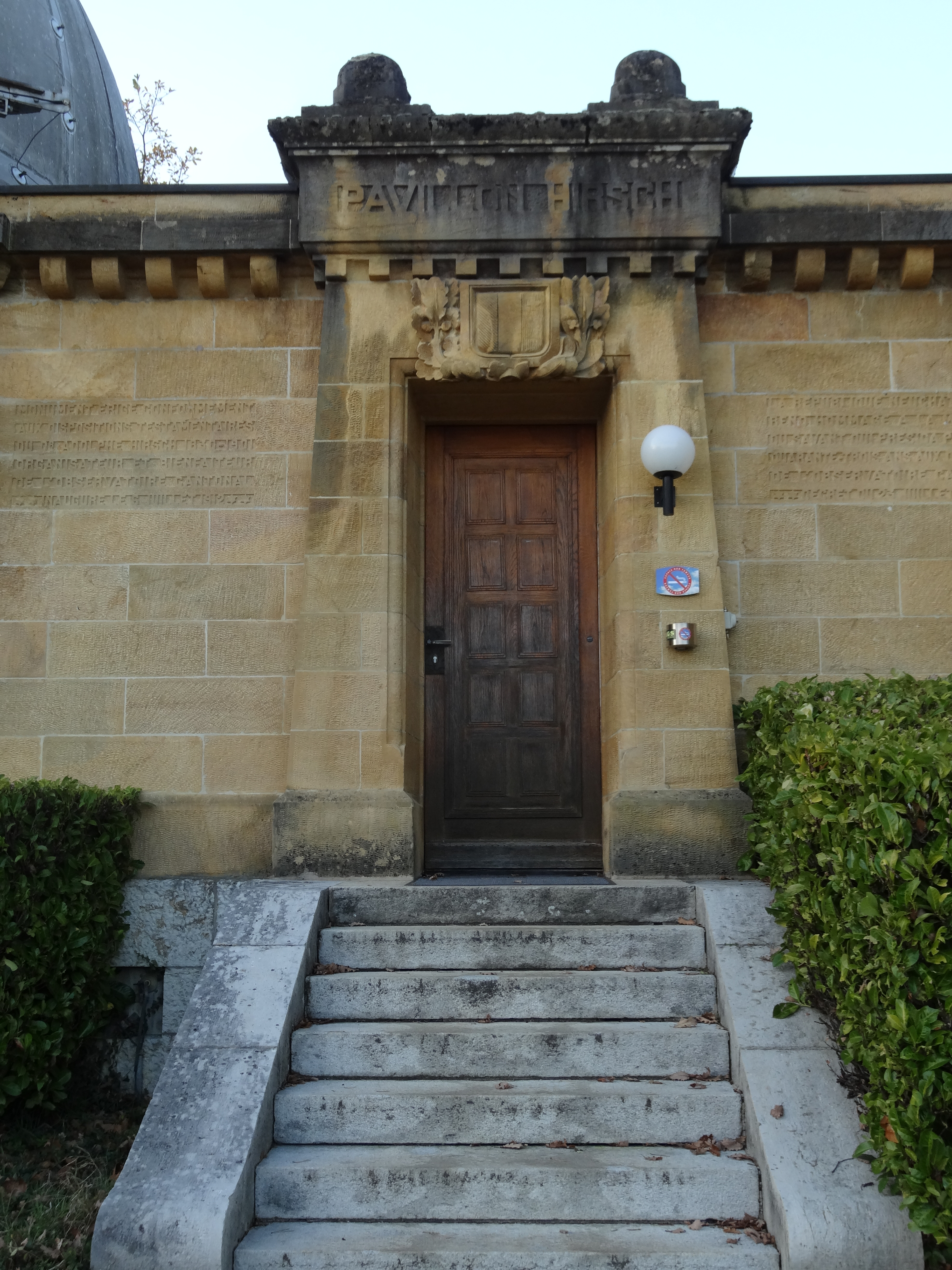 Neuchâtel, L'Observatoire, L'entrée du Pavillon Hirsch.